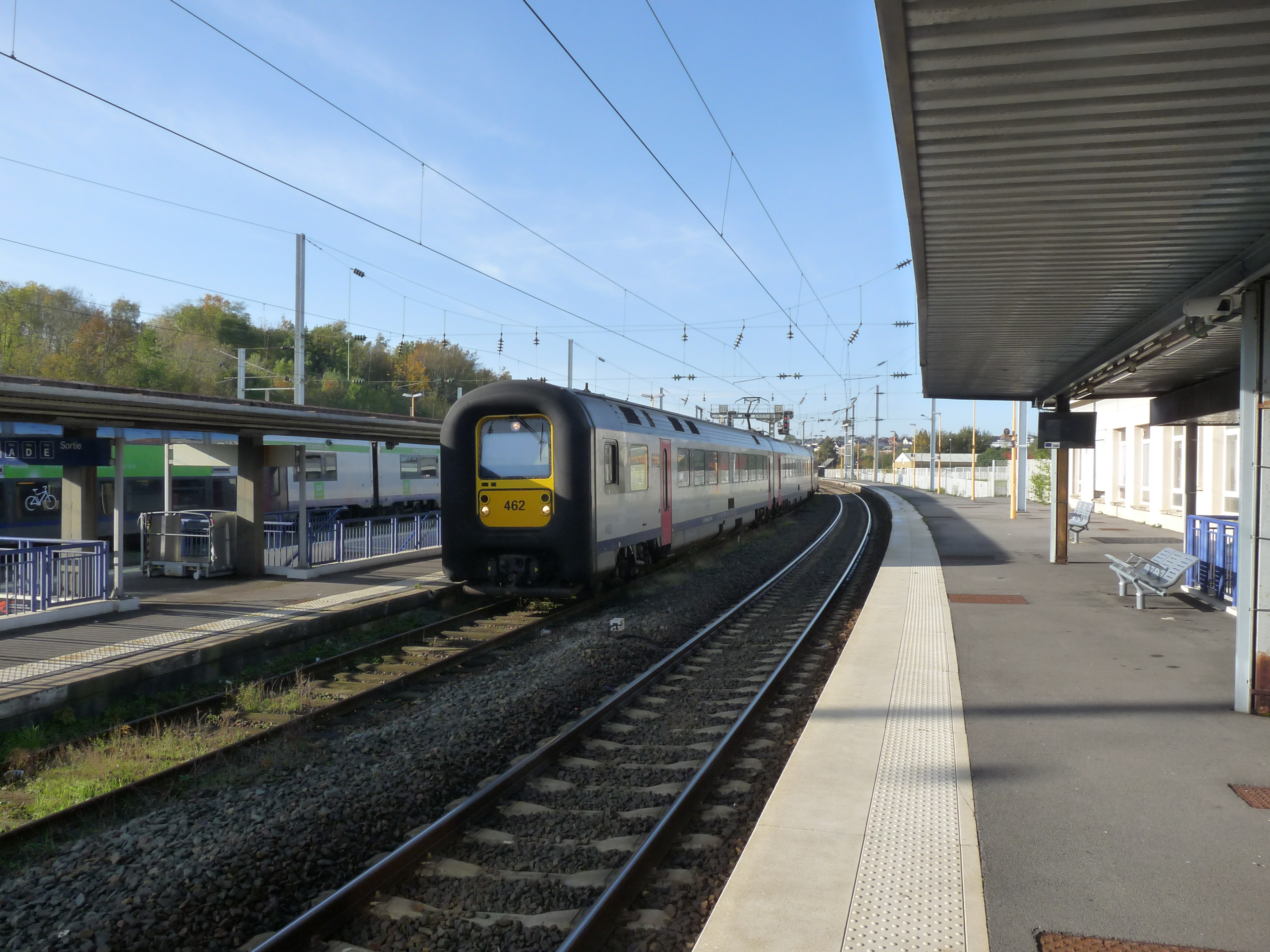 Station Maubeuge met de Belgische trein naar Charleroi, Namen